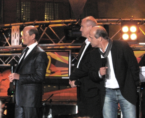 Koncert inaugurujący jesienną ramówkę TVP (Warszawa, ul. Woronicza): na scenie prowadzący Pytanie na śniadanie